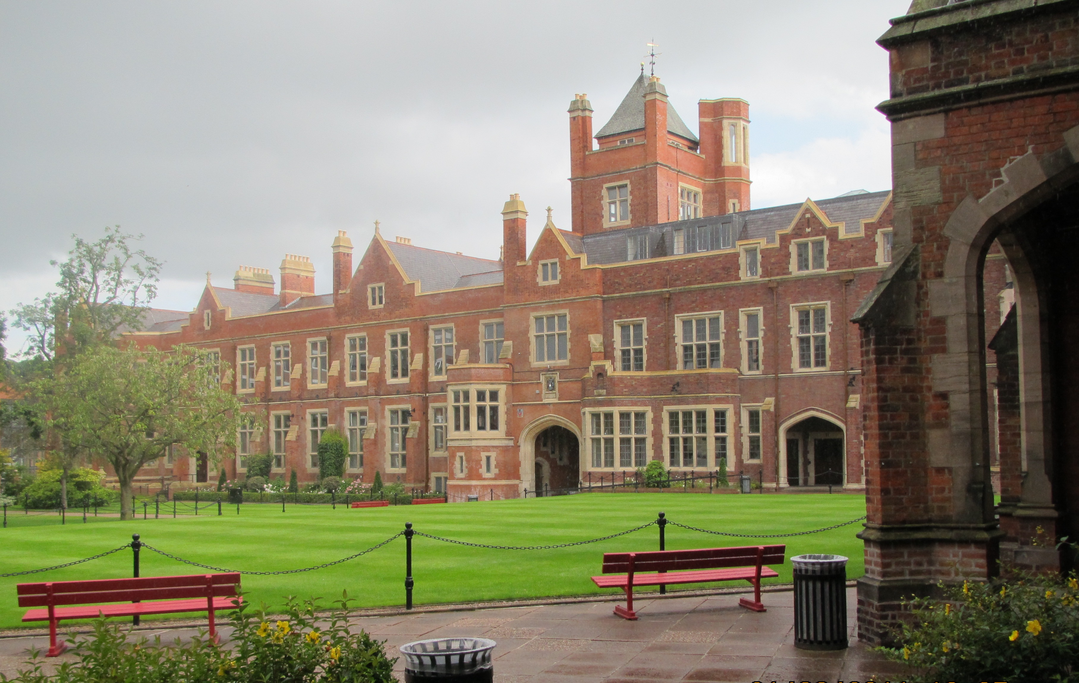 Queen's University Belfast6 by Paride.jpg